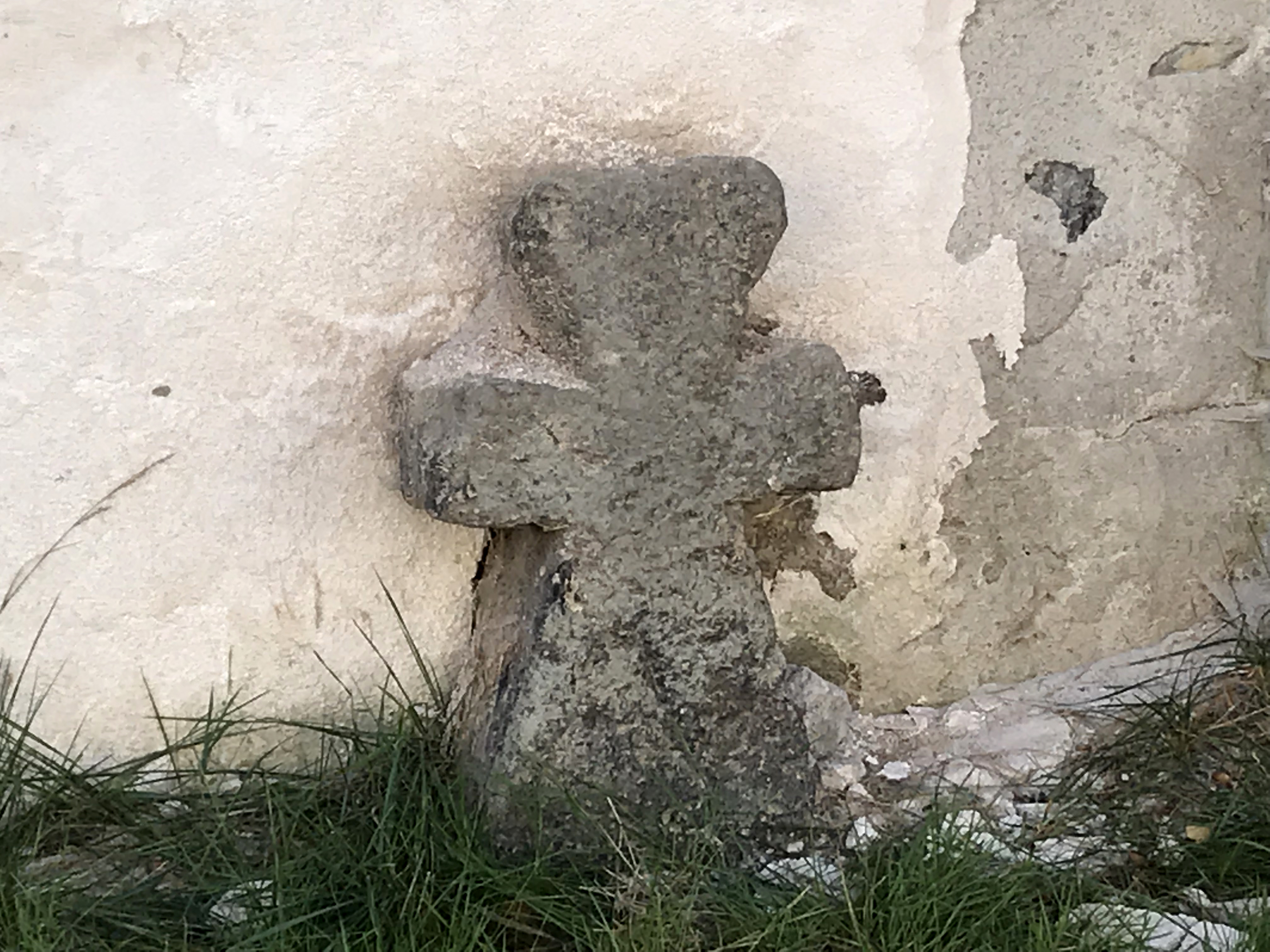 Smírčí kříž v Jakubově (Vojkovice) u zdi bývalé porcelánky